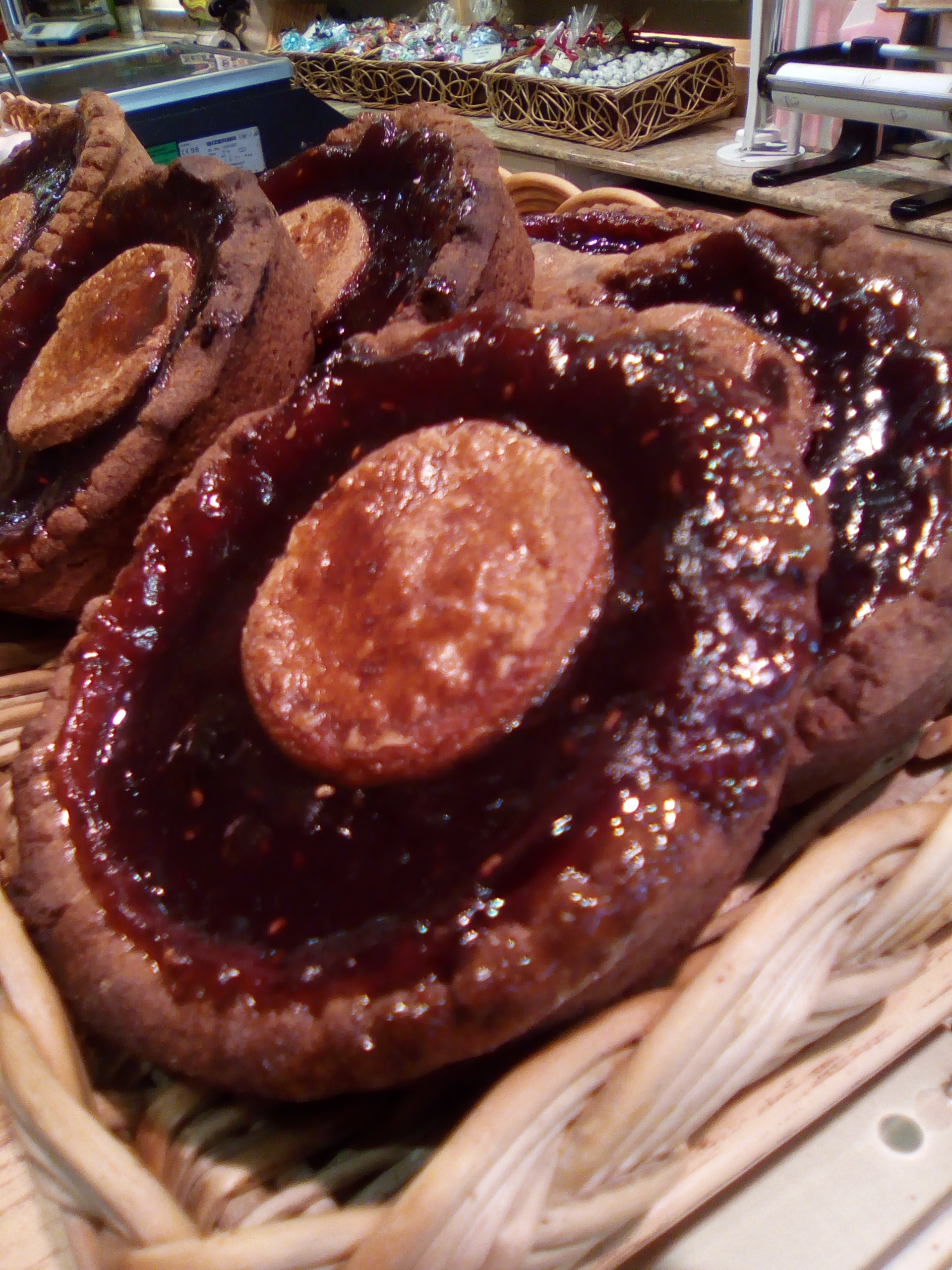 Tartelettes "Linzer" dans une boulangerie à Colmar